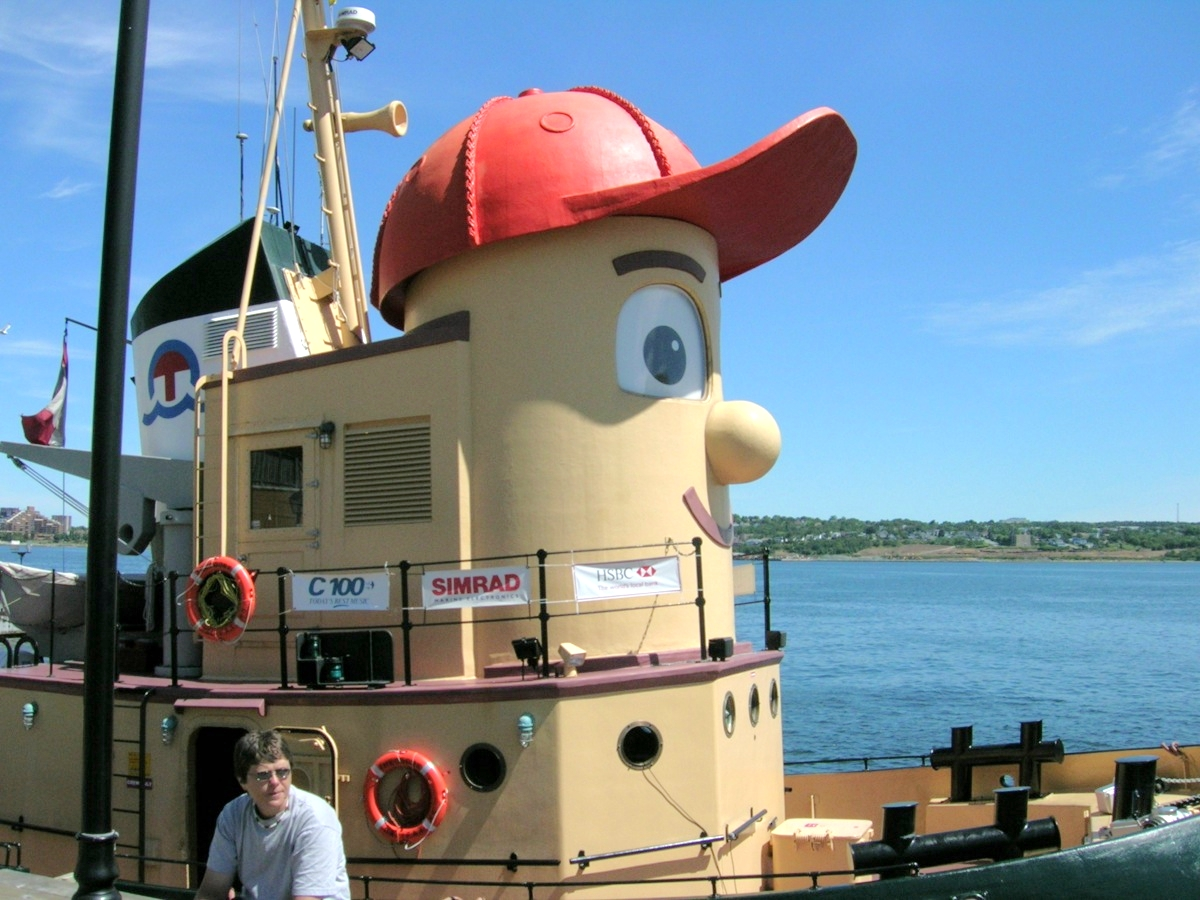 Halifax Harbour